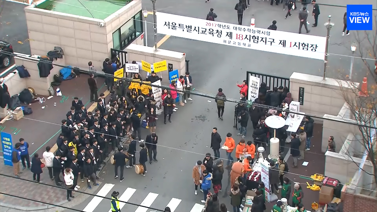 2016년 대학수학능력시험 수험생들 응원